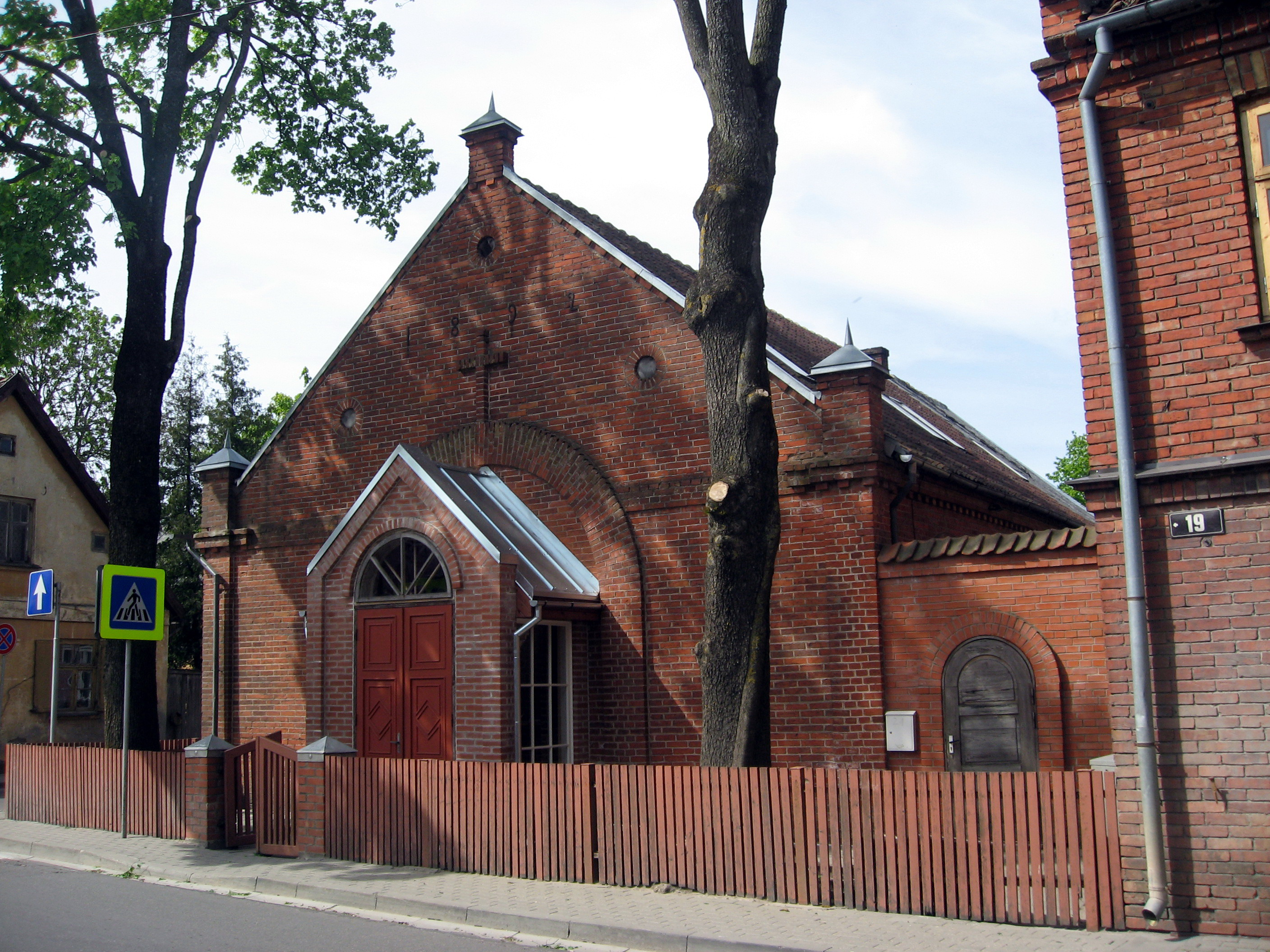 Kuldīga, baptistický kostel